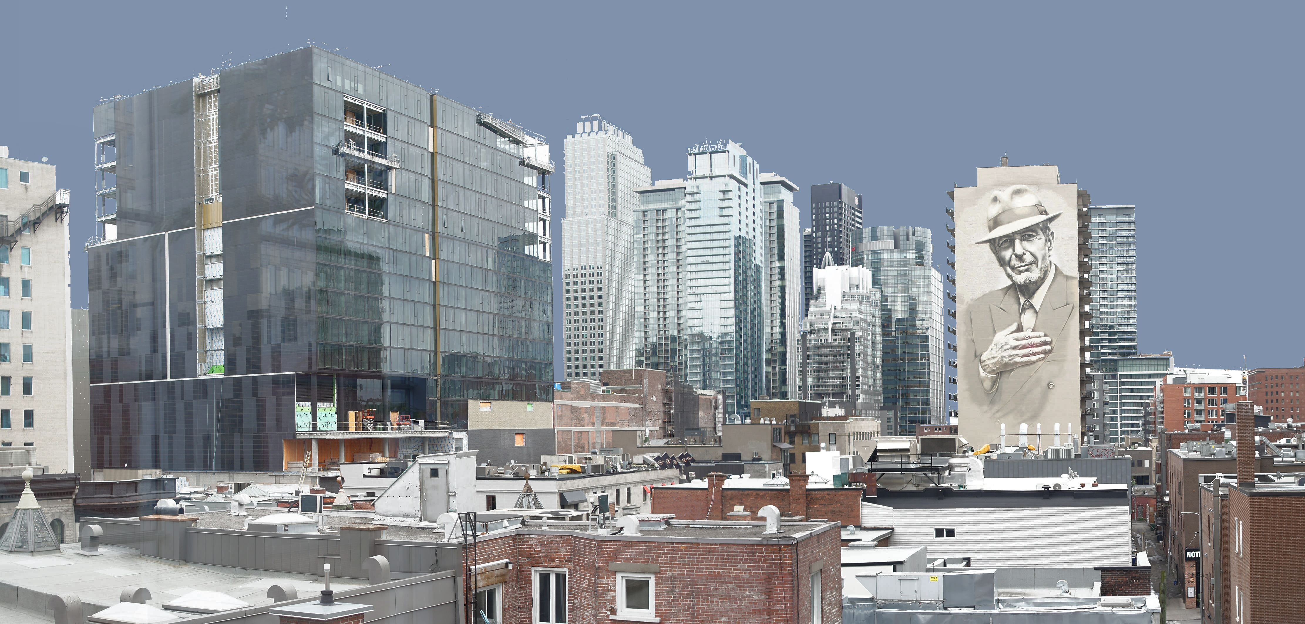 Panorama de Montréal, depuis le Musée des beaux-arts de Montréal (MBAM).